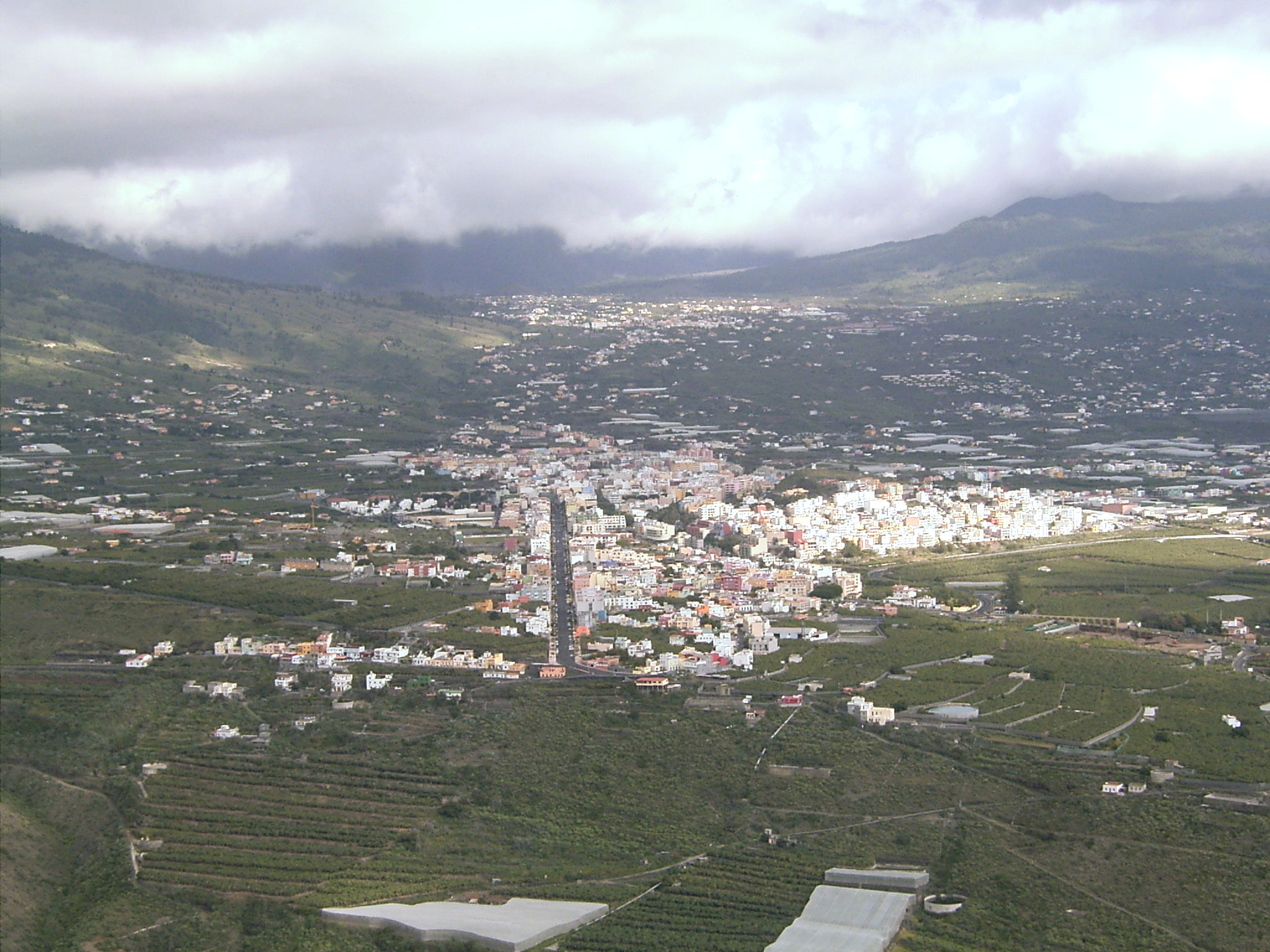 Los Llanos de Aridane, La Palma, Canary Islands